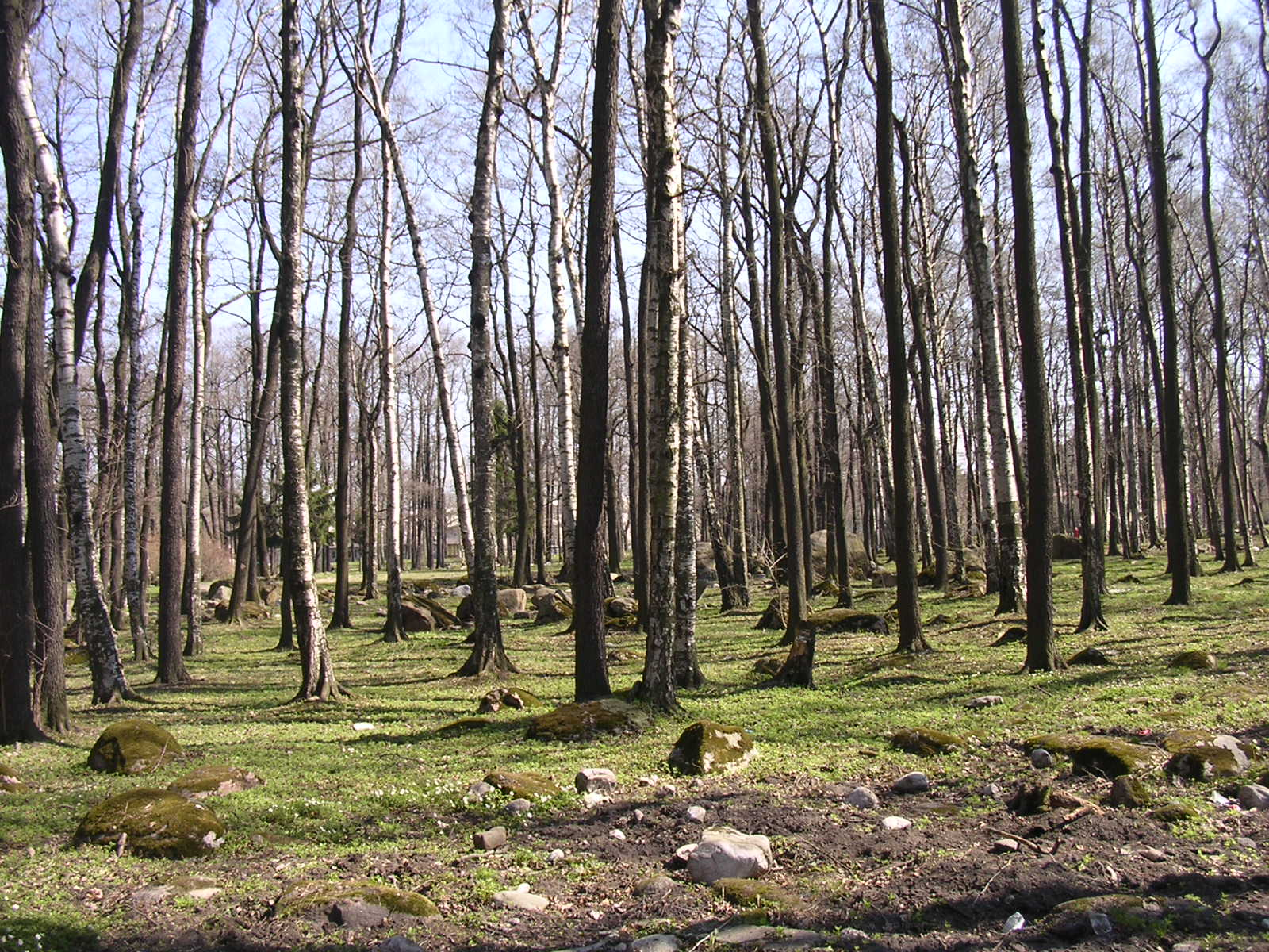 Park Koplis